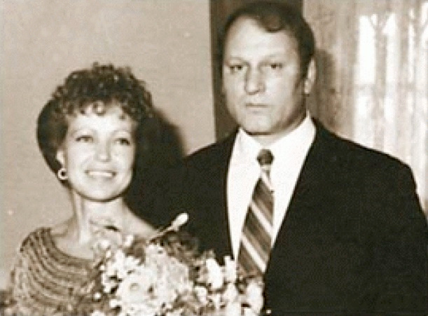 Mioara Velicu and Nicolae Martinescu